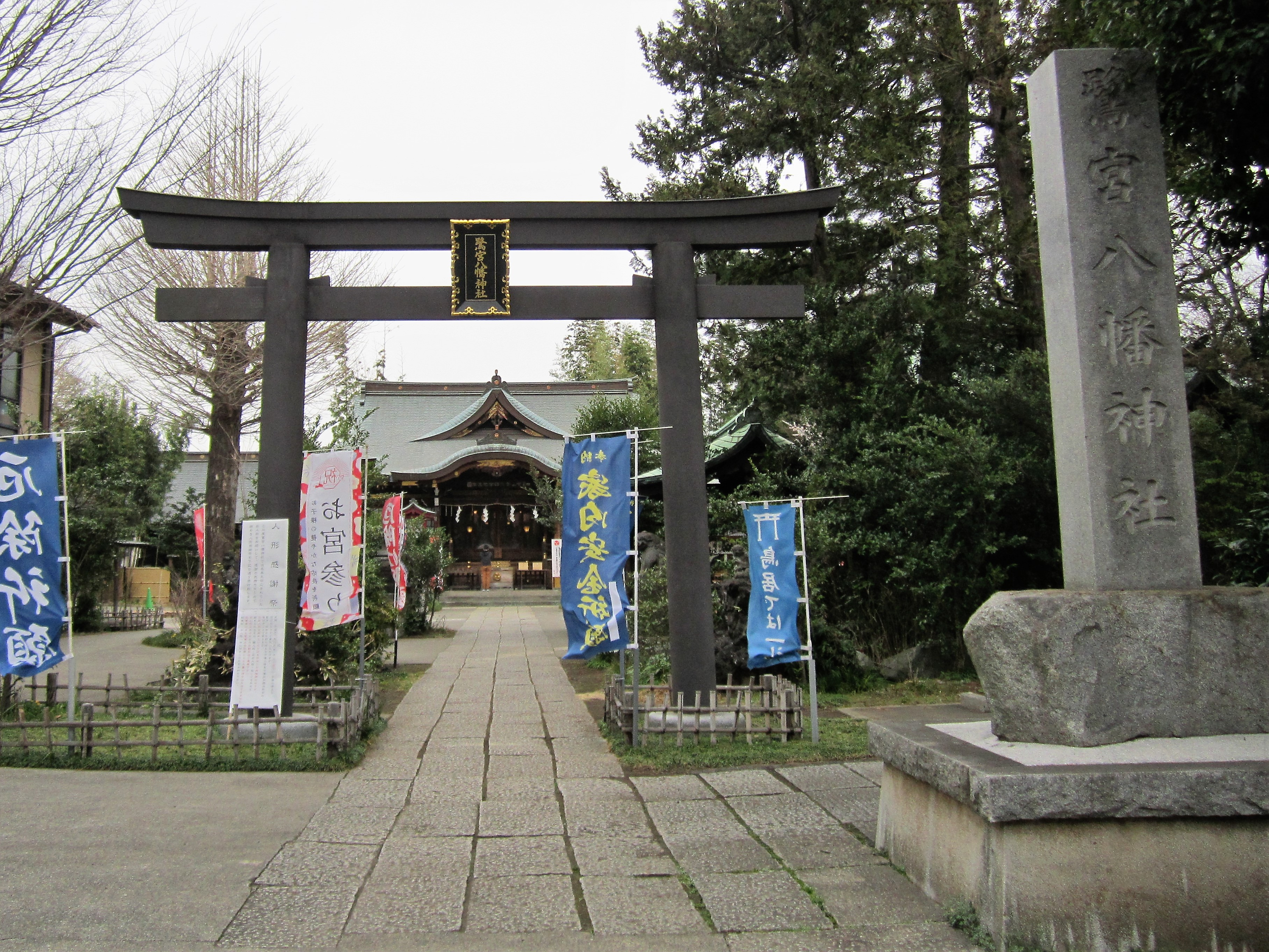 鷺宮八幡神社（中野区白鷺）改築後の鳥居 Canon PowerShot A2200